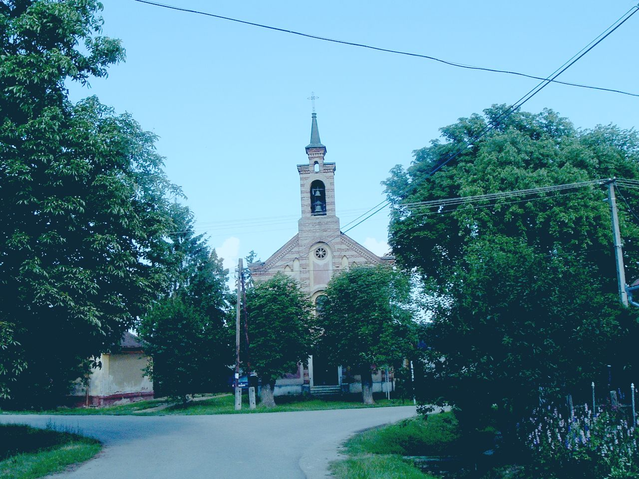 Roman Catholic Church in Nemeskolta, Hungary. Szent Márton római katolikus templom